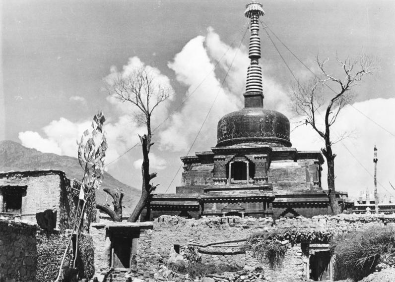 Tibetexpedition, Kloster Samye Samjeh [Samye], Tschorten im Kloster Samjeh [Tschorten, Chörten, tibetische Stupa]